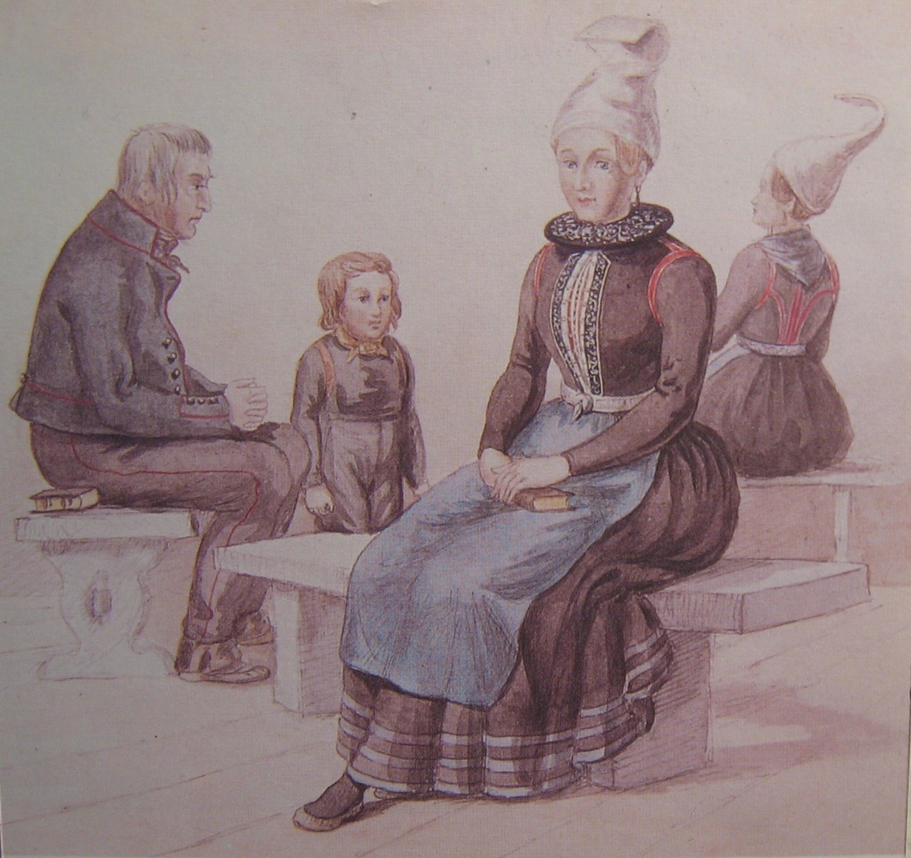 Faldbúningur. Vatnslitamynd í Listasafni Íslands. Eftir Carl L. Petersen.